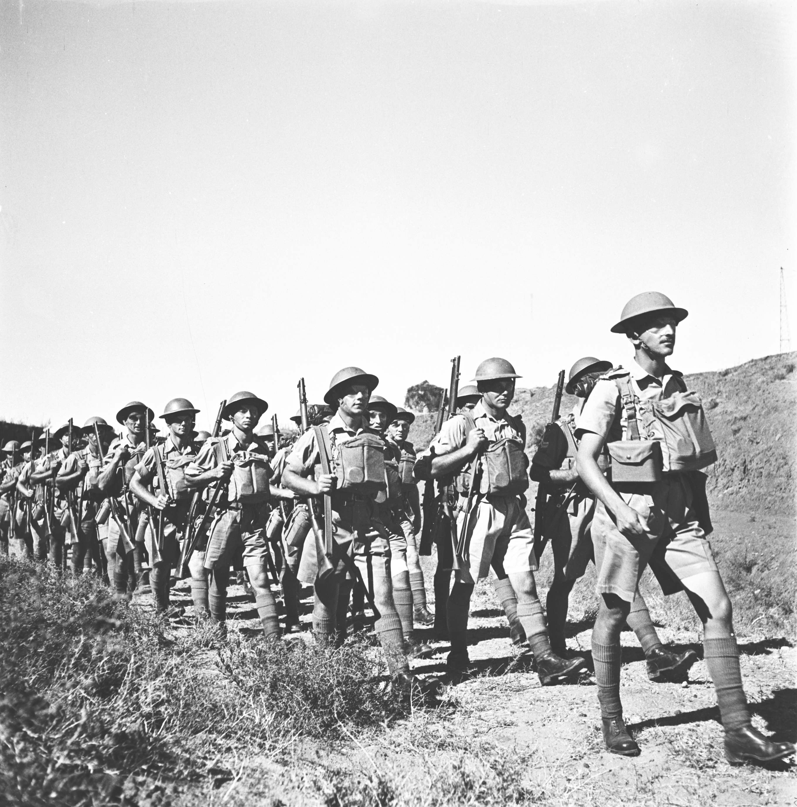 אוסף צילומים של הצלם זולטן קלוגר טווח מספרי התשלילים 16110 - 16161: Buffs 6th Coy (חיילים עברים בשירות רג'ימנט מזרח קנט, "באפס")